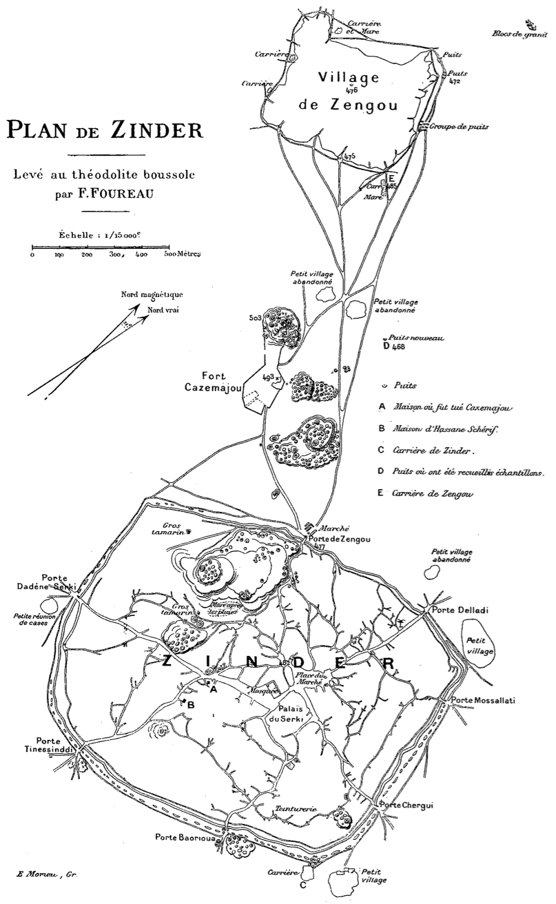 Mission Foureau-Lamy: Plan de Zinder.